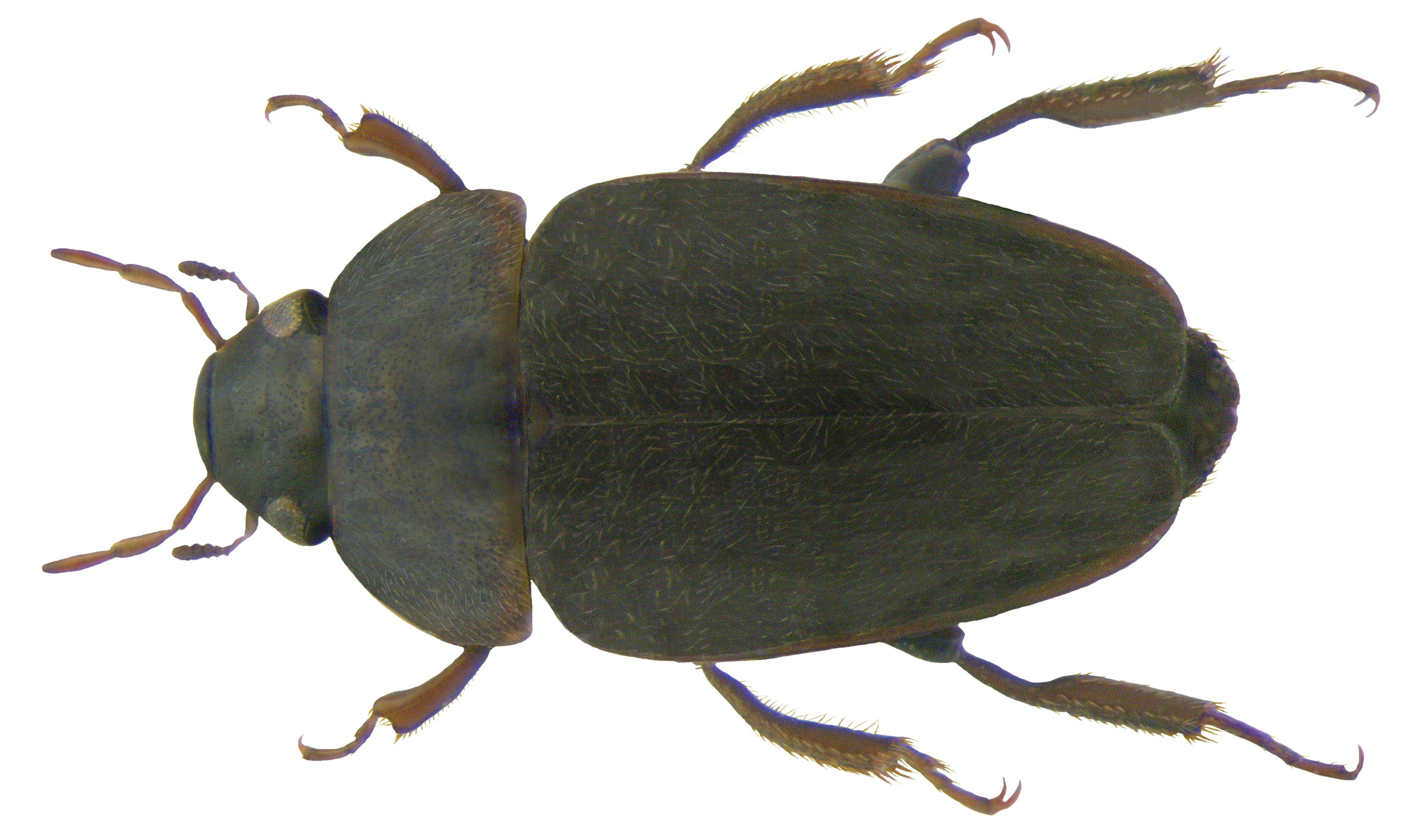 Familie: Hydraenidae Grösse: Männchen 2,5 mm; Weibchen 1,8 mm Verbreitung: Europa Ökologie: in Fließgewässern Fundort: Germania, Bayern, Oberfranken, Selbitz leg. det. U.Schmidt, 2002 Foto: U.Schmidt, 2009